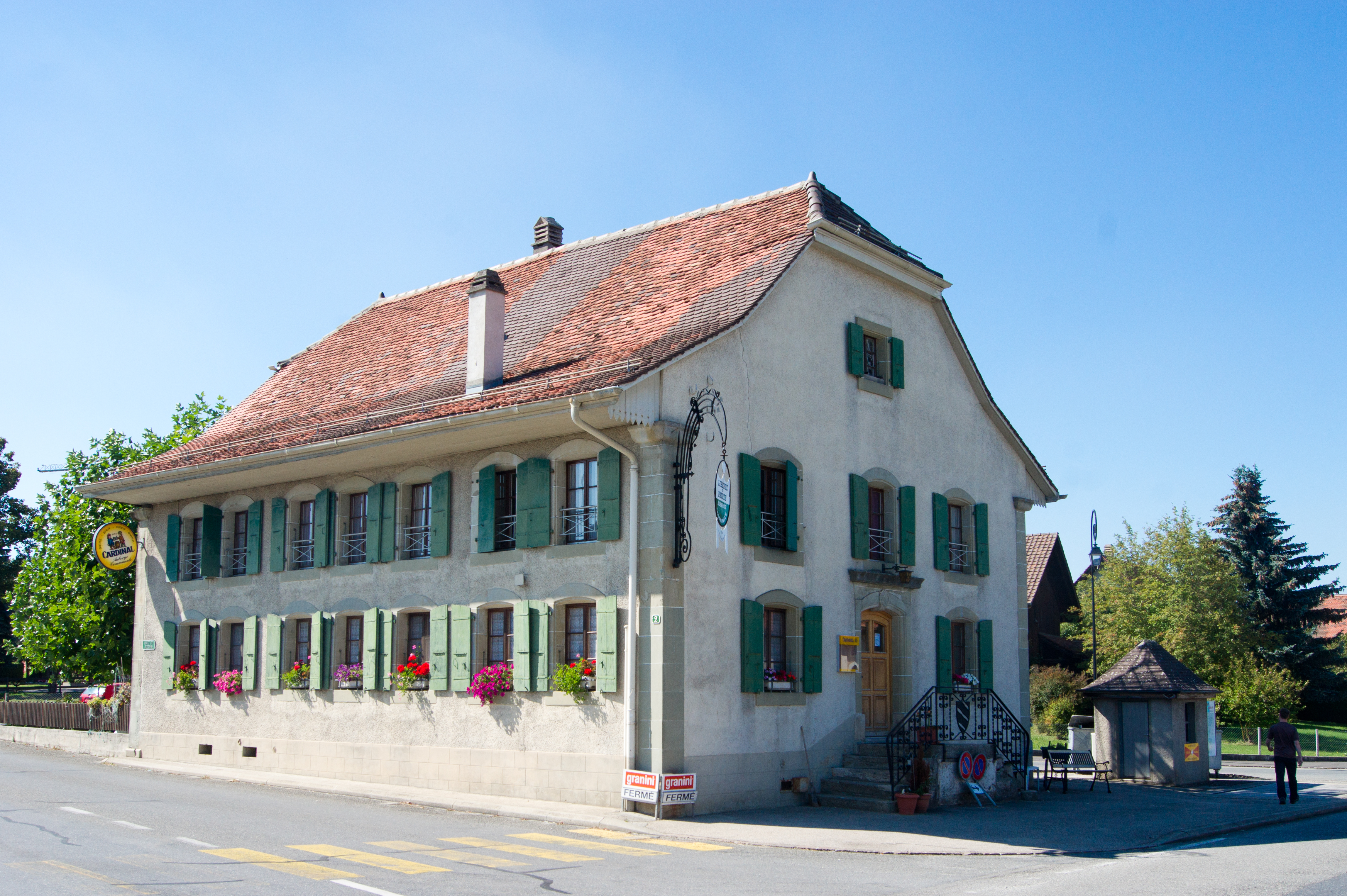 Auberge communale de Poliez-le-Grand. Suisse.